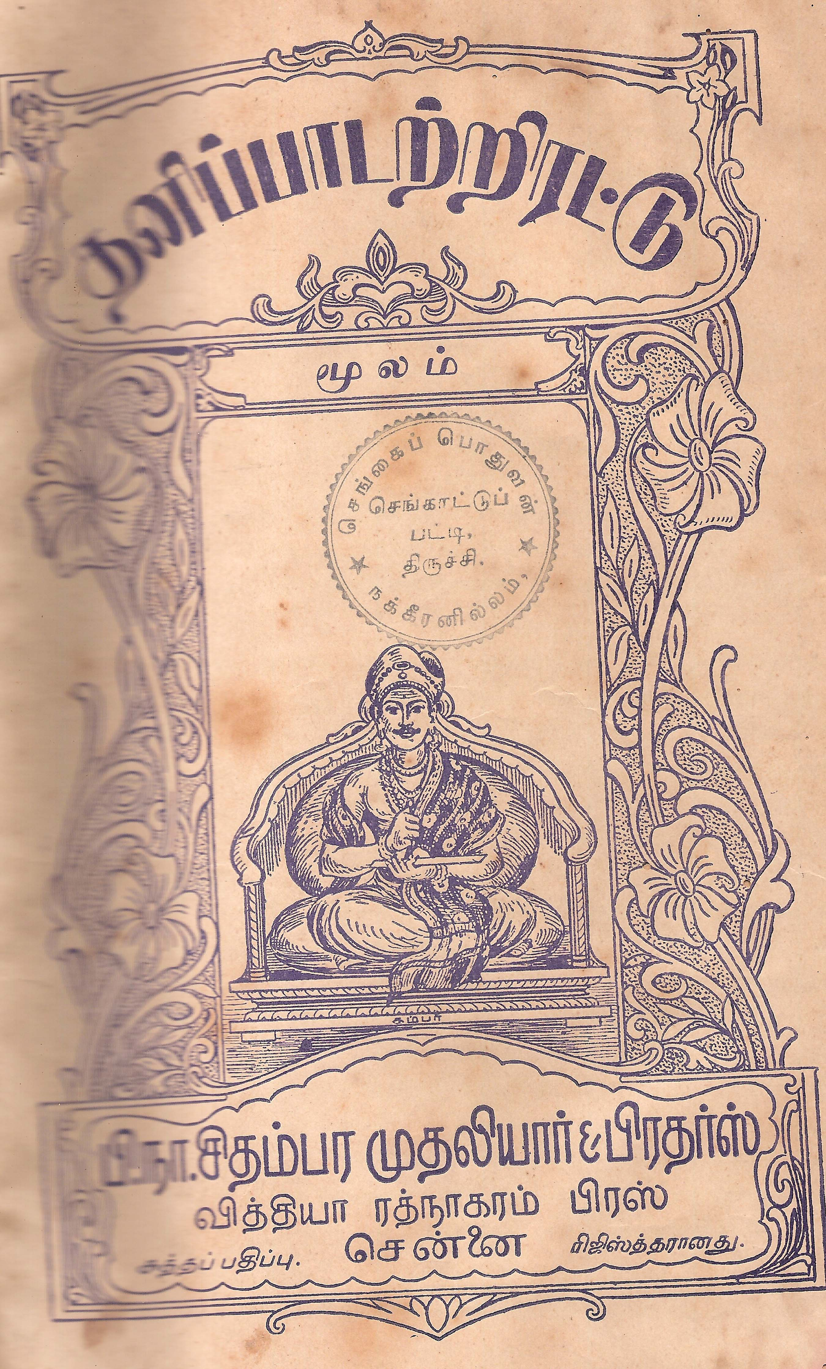 பழந்தமிழ் நூலின் முகப்பு